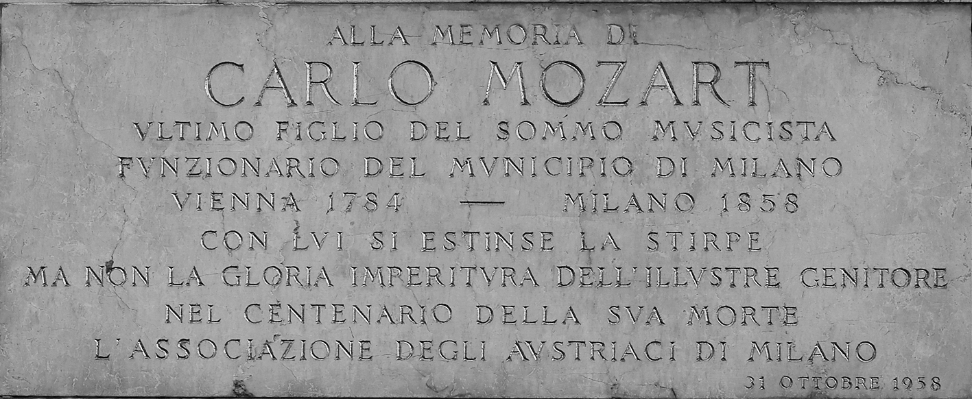 Lapide voluta dall'associazione degli austriaci di Milano in memoria di Carlo Mozart al Cimitero Monumentale di Milano